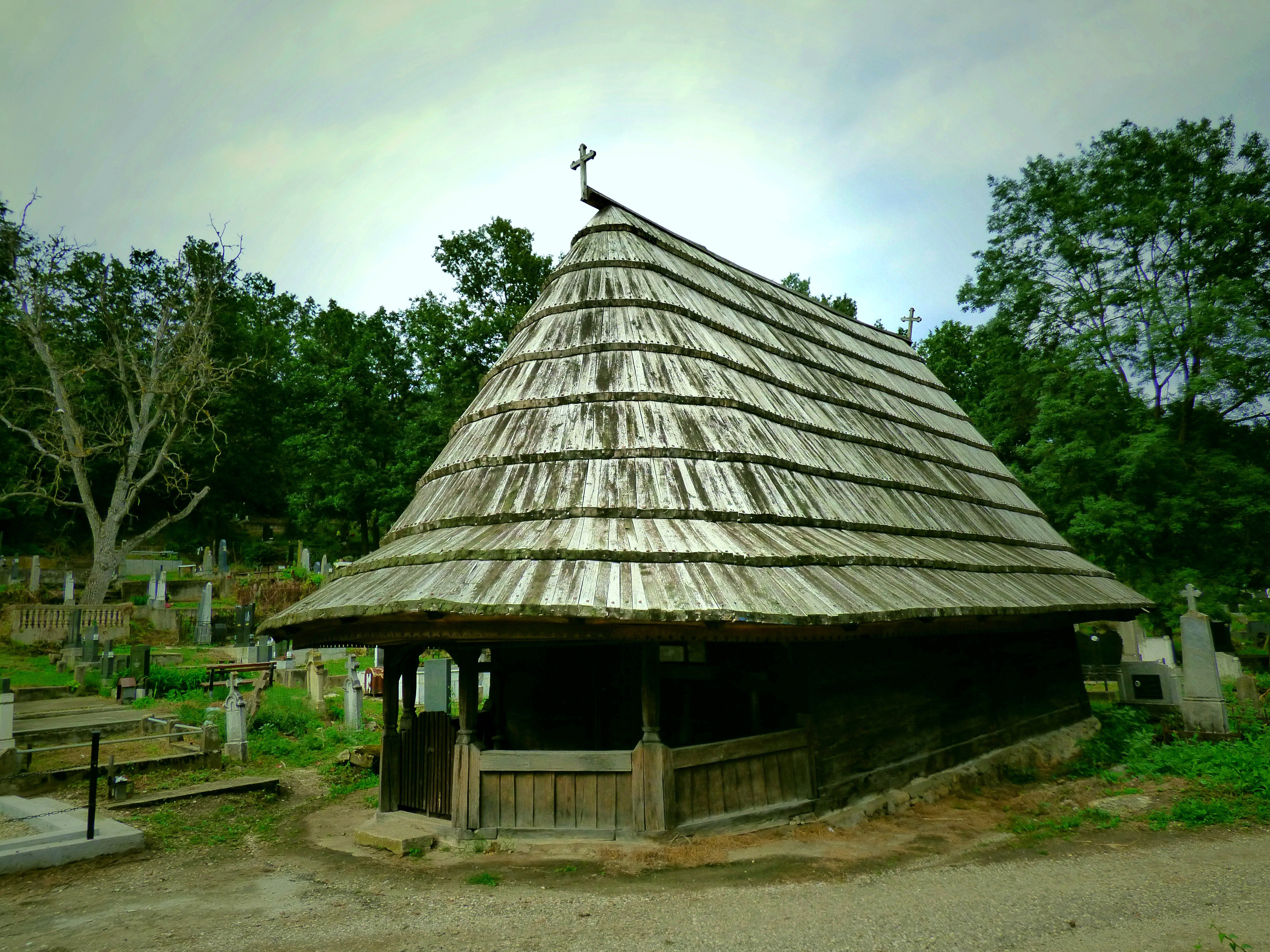 На сеоском гробљу у Рачи Крагујевачкој налази се црква брвнара Арханђела Михаила, по предању место Карађорђевог крштења. Историјски извор и запис на брвну крај улаза у храм одређују изградњу у 1826 - 1827, па ако је и постојала старија богомоља у XVIII веку она је вероватно страдала у време борби за ослобођење од Турака. Постојећа грађевина представља један од најлепших примера цркава брвнара.